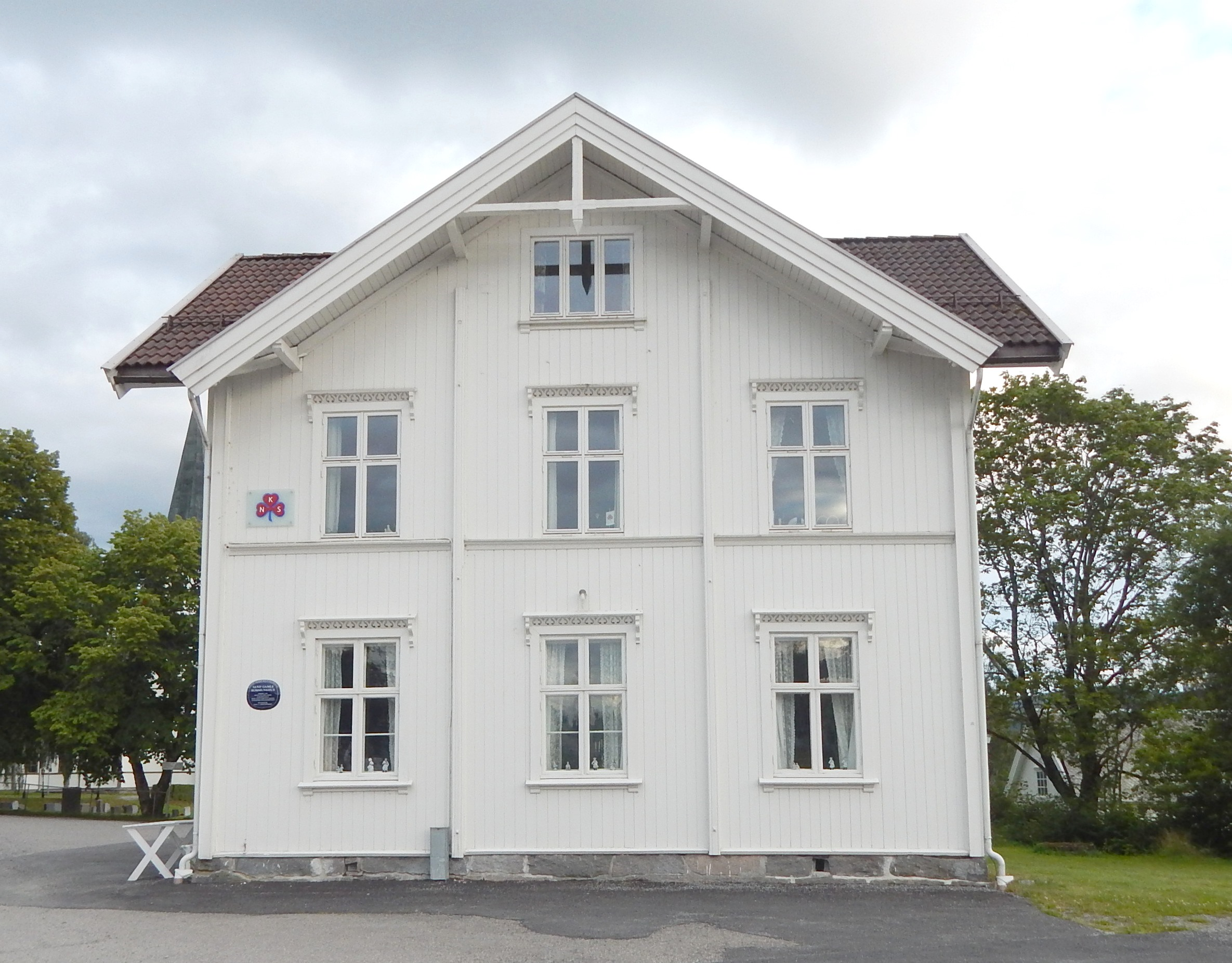 Sand gamle kommunehus